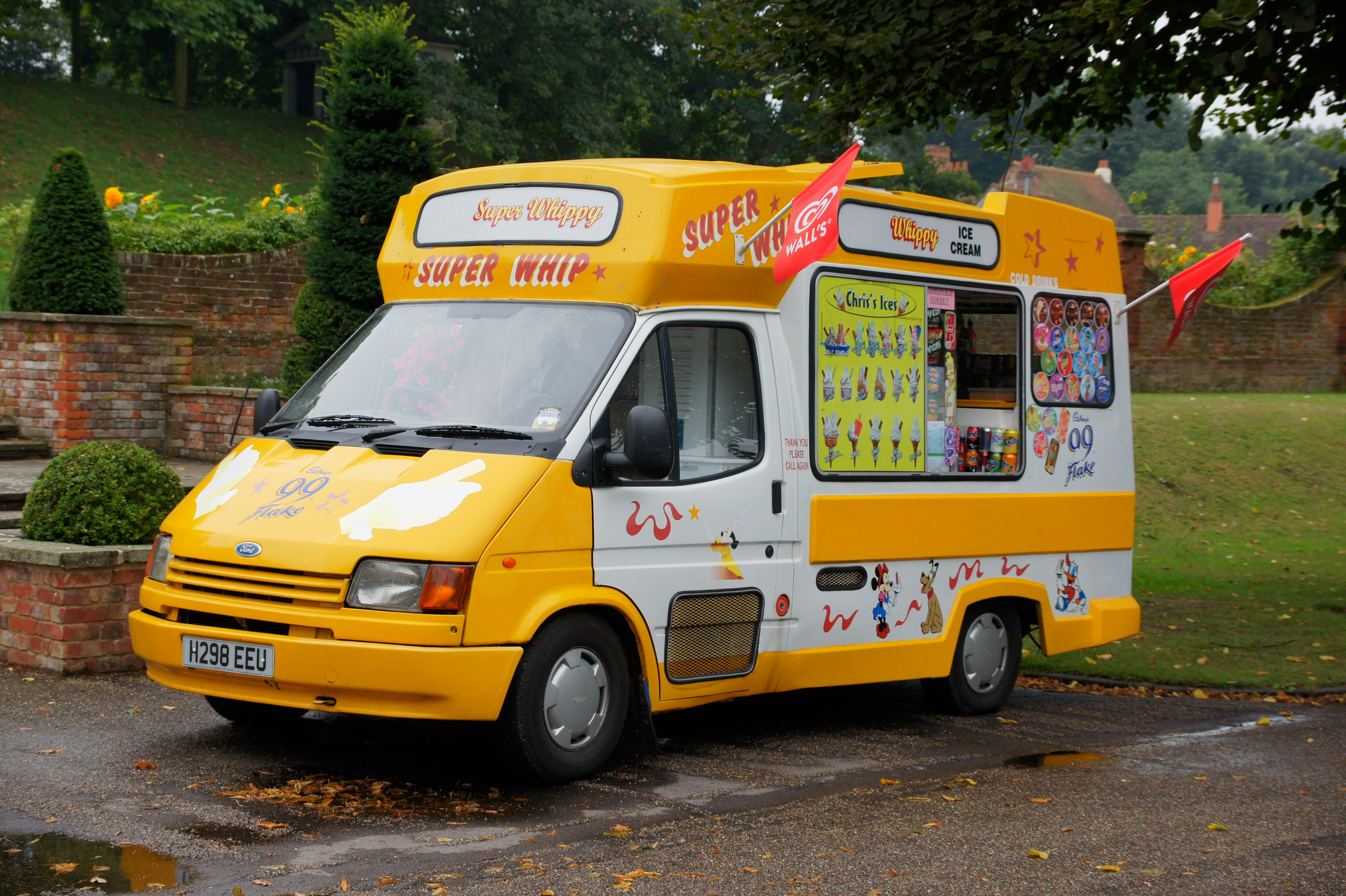 H298EEU 240813 CPS